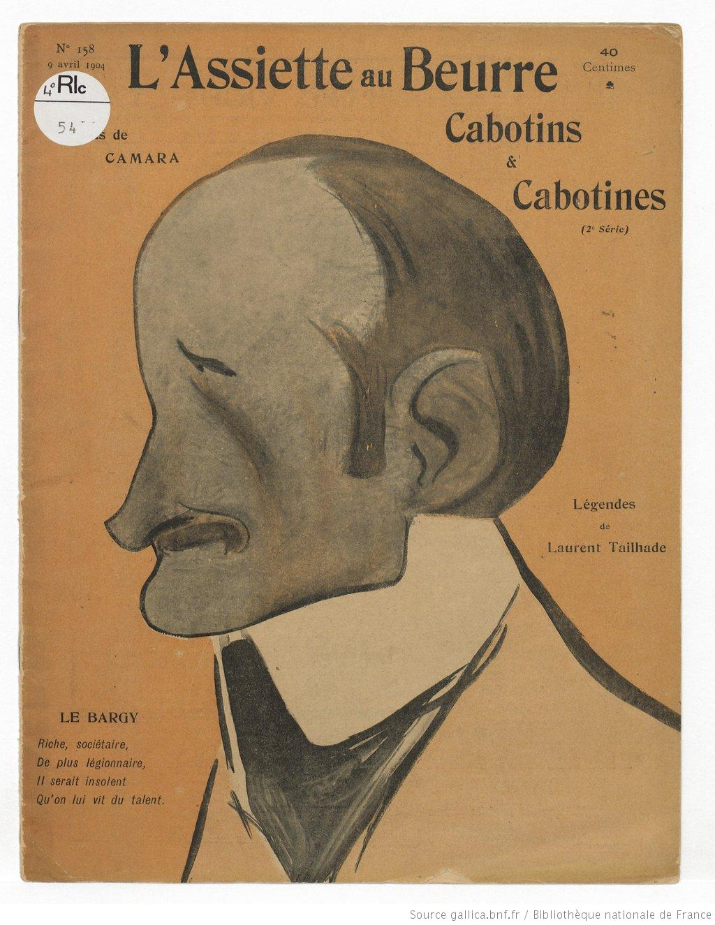 Couverture du Numéro 158 du 9 avril 1904.